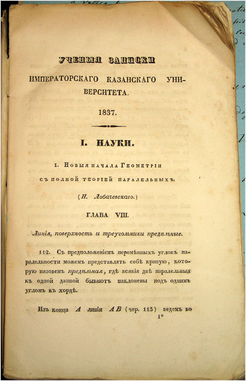 Лобачевский Н. И. Новые начала геометрии с полной теорией параллельных // Ученые записки, издаваемые императорским Казанским университетом. — 1837. — Кн. 1. — Казань: Университетская типография, 1837. — 171 с. (Фото страницы журнала, находящегося в Национальном архиве Республики Татарстан. — НСБ. — № 3610.)